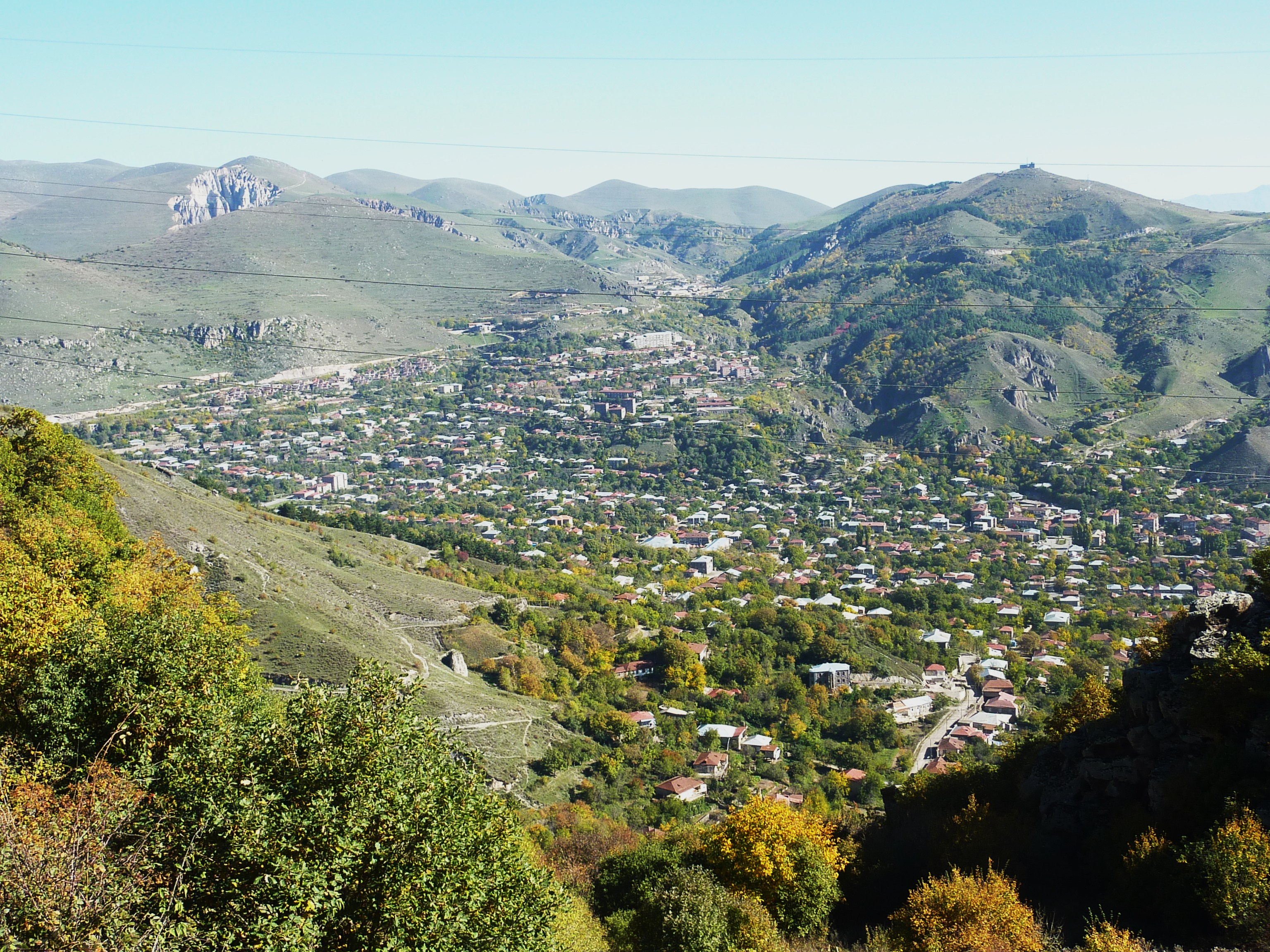 Goris : vue panoramique de la ville